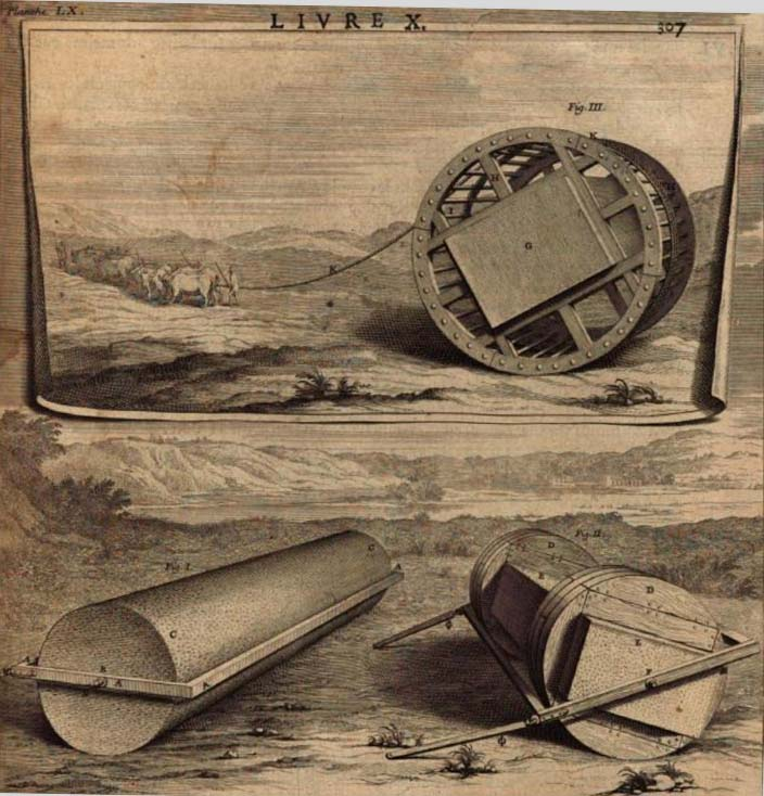 Moyens décrits par Vitruve dans "Les dix livres d'Architecture" pour transporter les pierres de tailles importantes